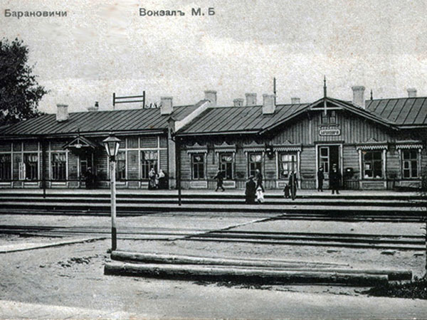 Железнодорожный вокзал Барановичи (Беларусь)